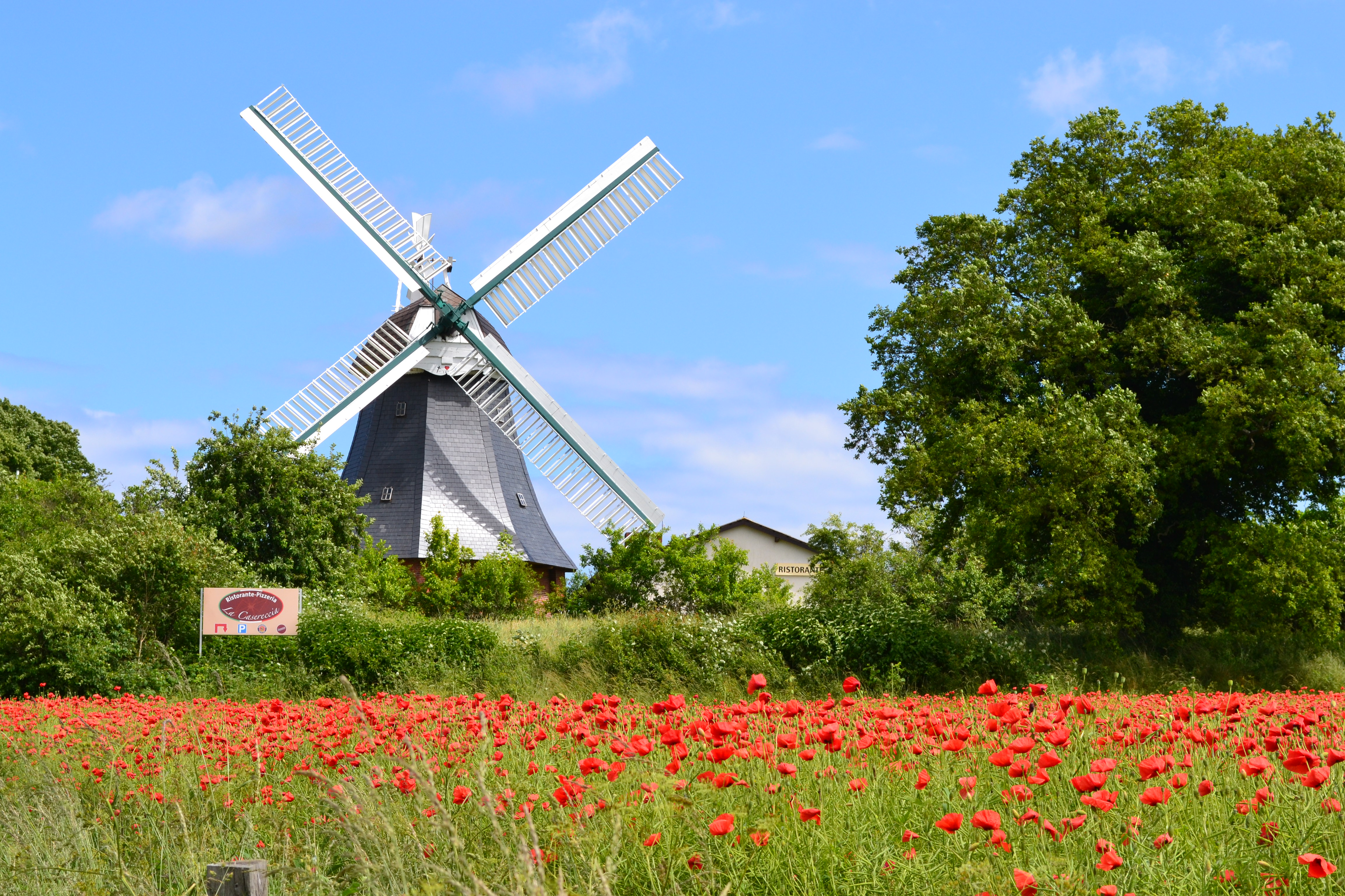 Die Krokauer Mühle